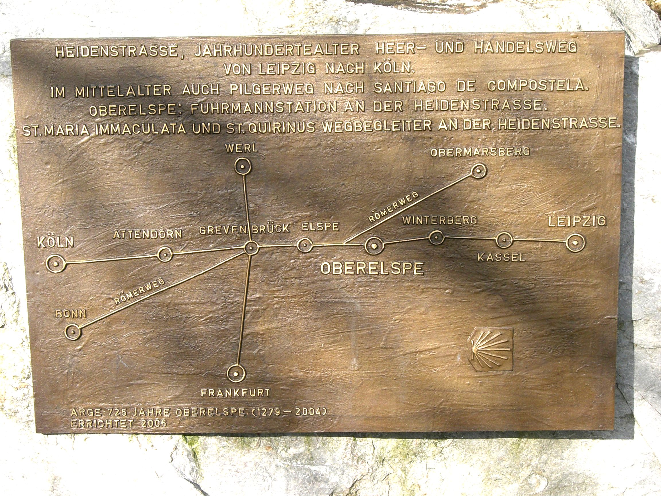 Dokumentation des Verlaufs der Heidenstraße im historischen Viertel von Oberelspe